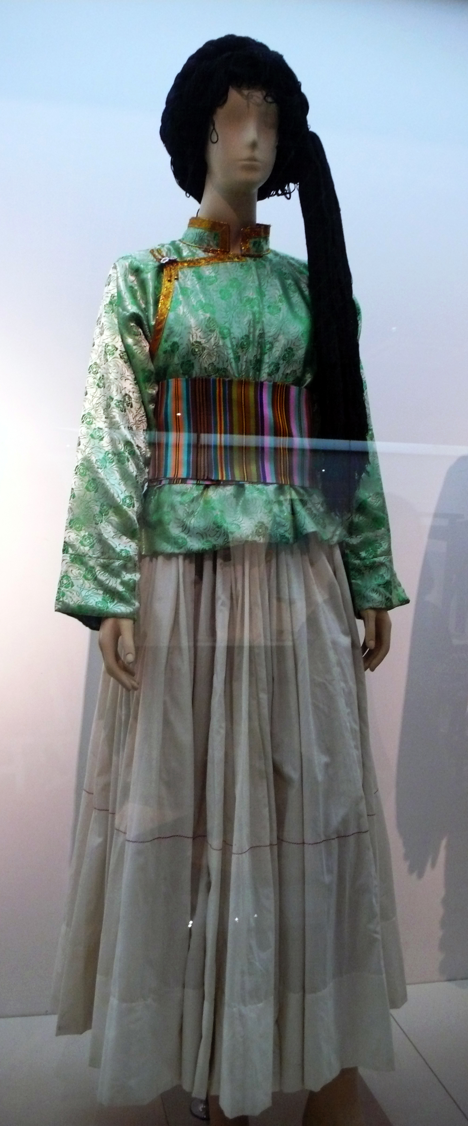 普米族绿缎白布氆氇腰带女服。民大民族博物馆藏。